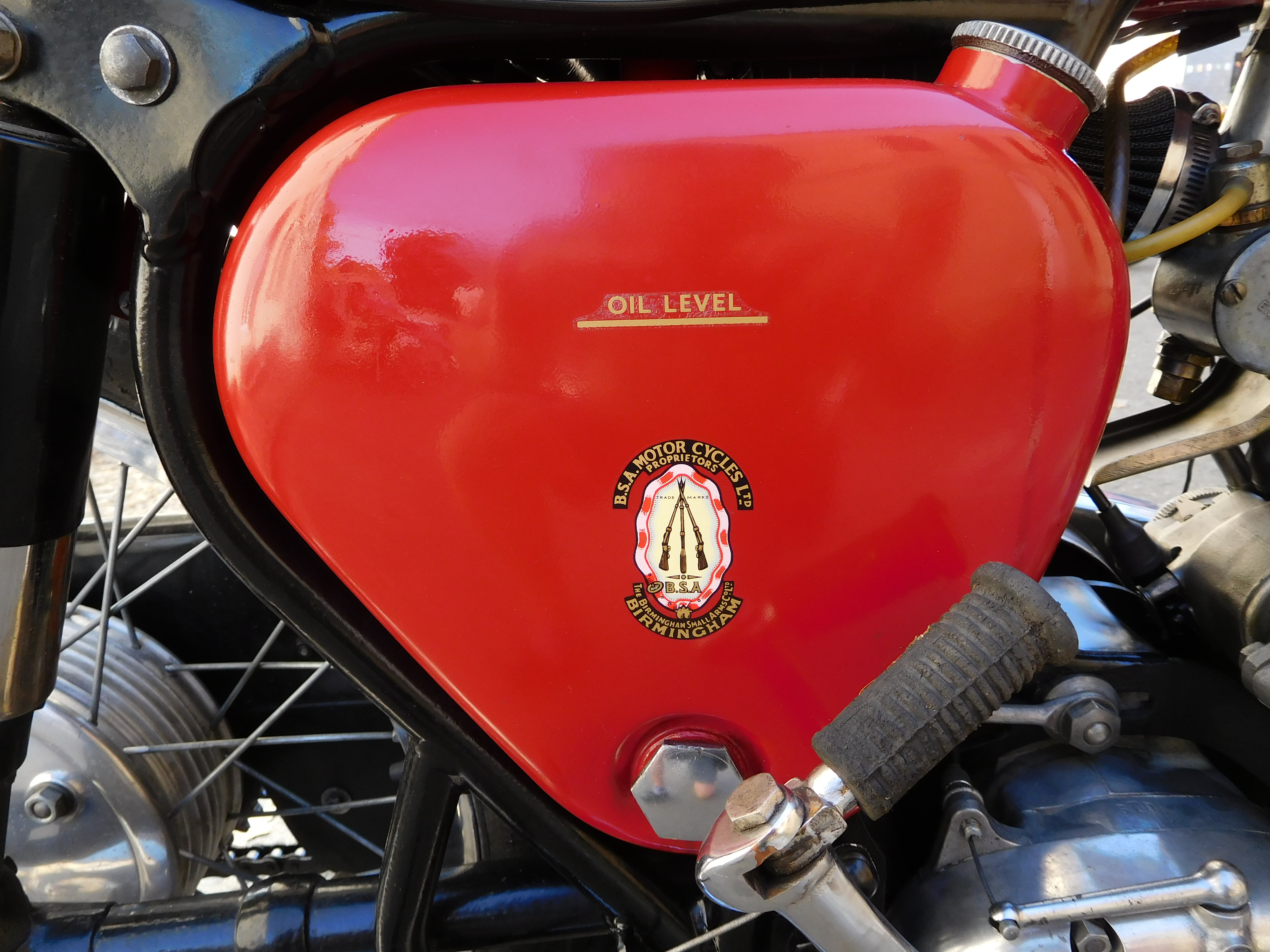 Moto BSA : réservoir d'huile latéral.